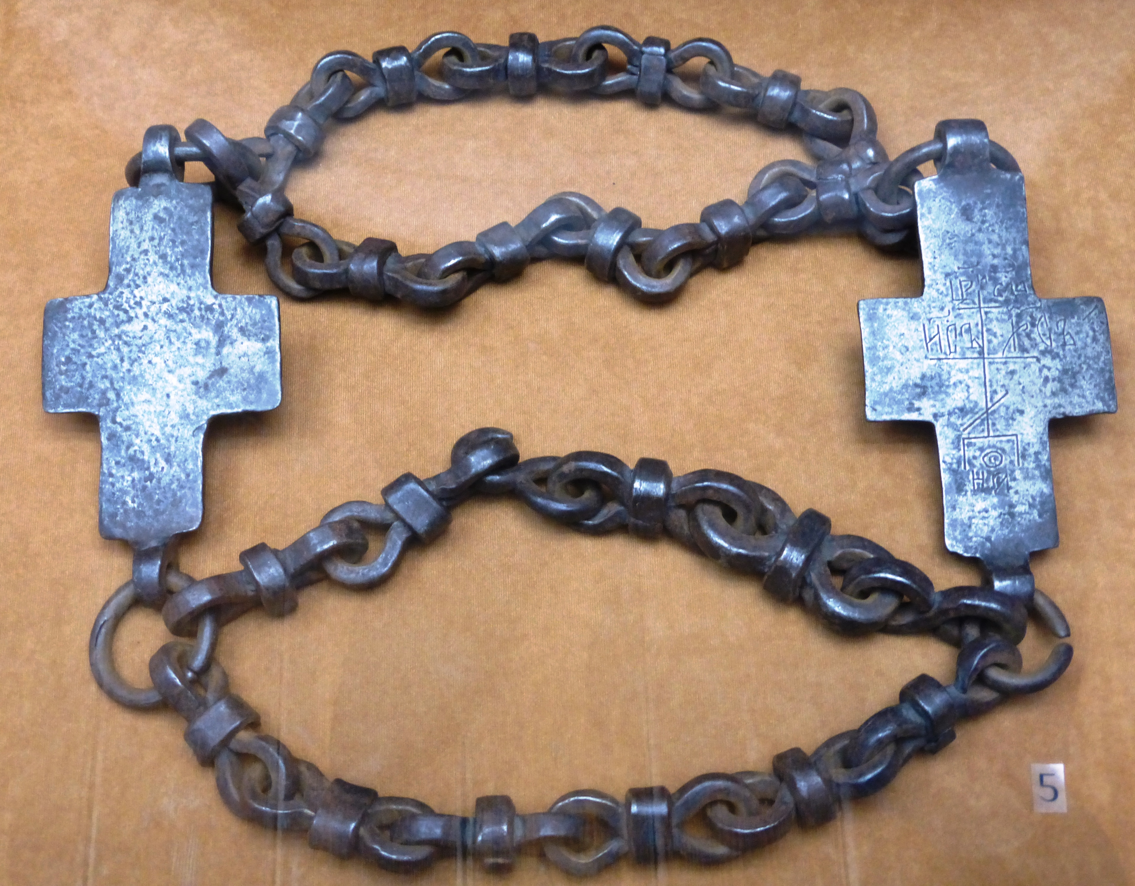 Вериги в музейной экспозиции Соловецкого монастыря